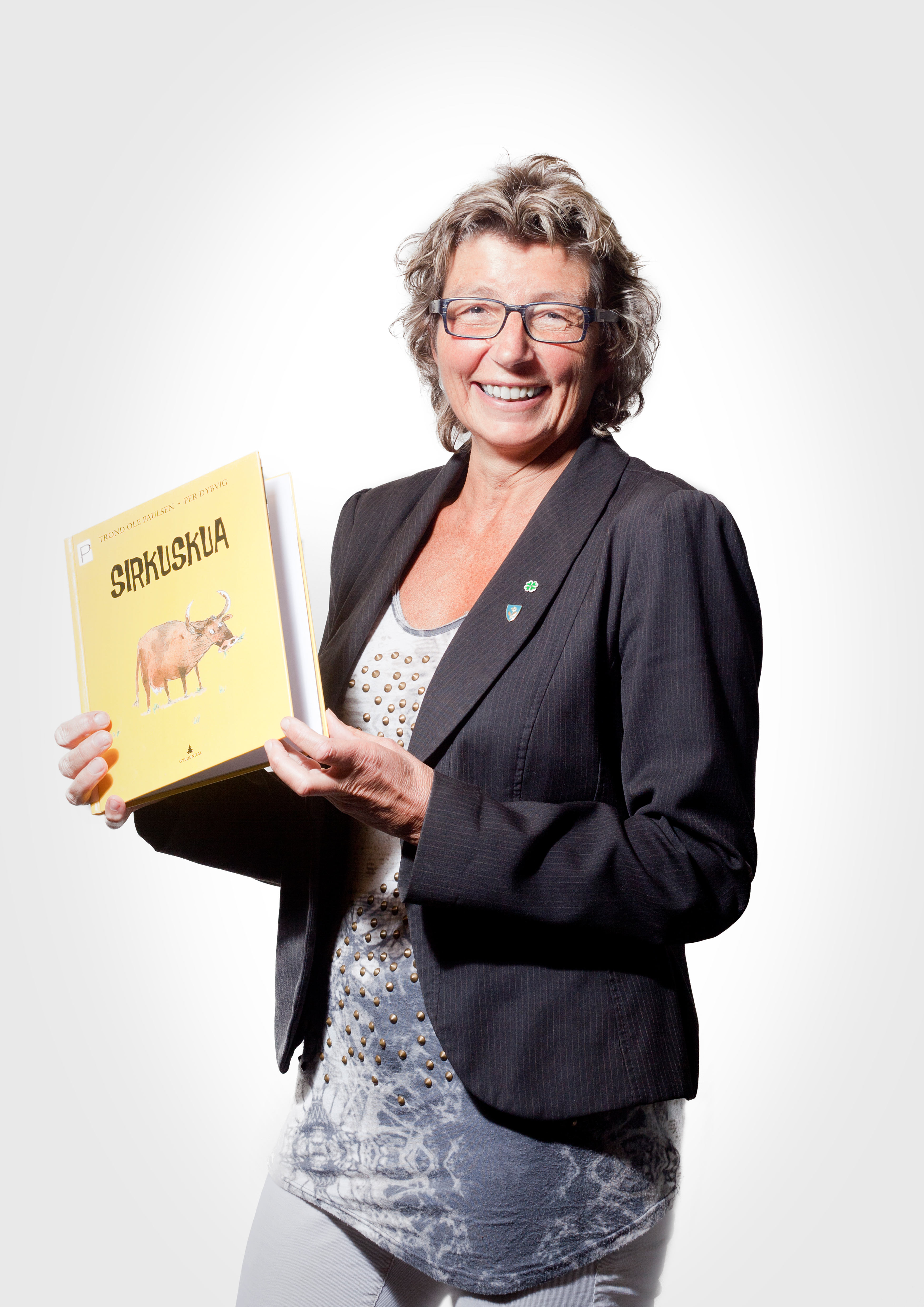 Ordfører Vigdis Hjulstad Belbo fra Snåsa, Nord-Trøndelag. Bildet er tatt i forbindelse med Nord-Trøndelag fylkesbiblioteks kampanje "Leseambassadører"